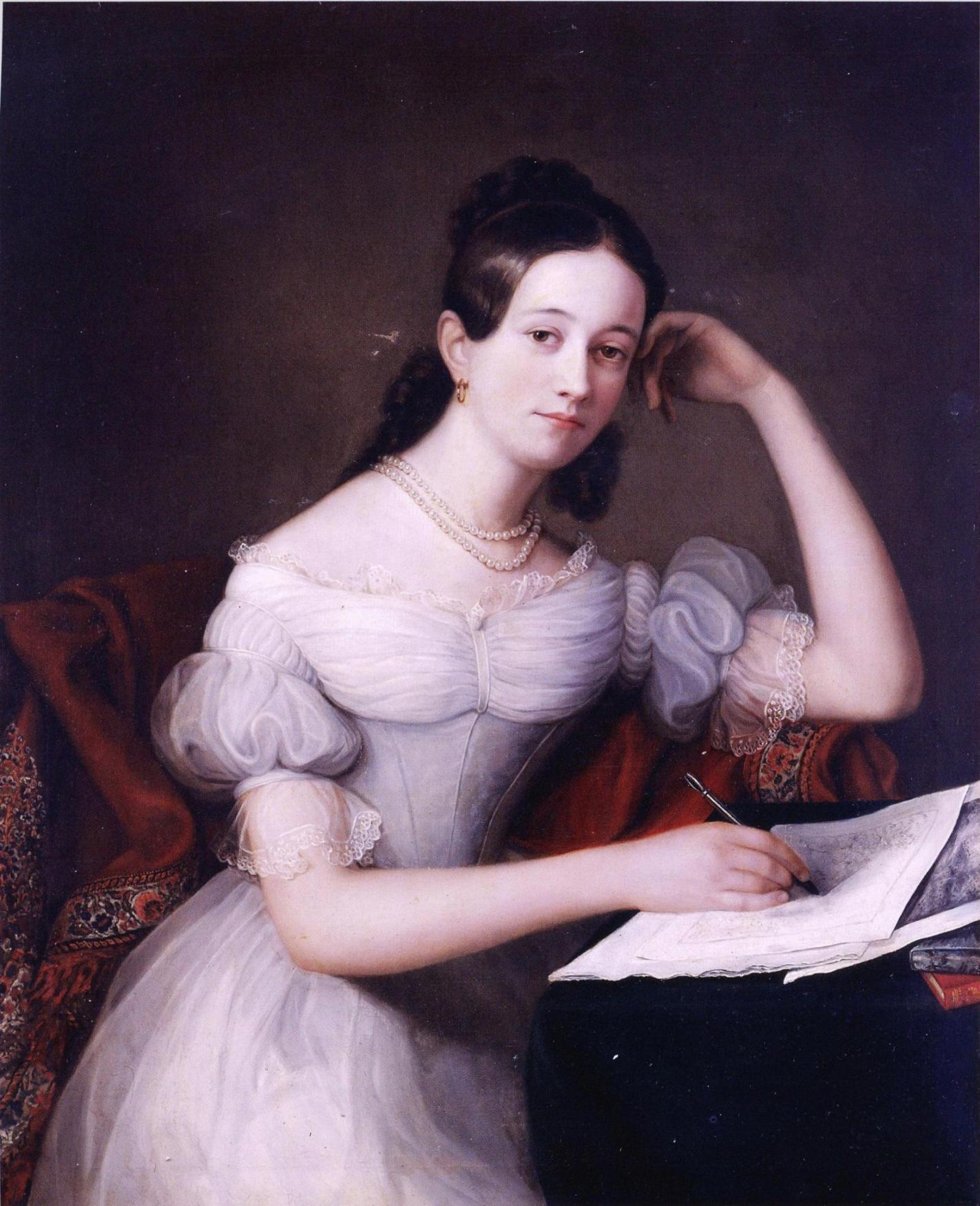 Mathilda Rotkirchin maalaus sisarestaan Aurora Therese (Teresia) Rotkirchista jäljentämässä kuparipiirrosta. Teos on yksityisomistuksessa.